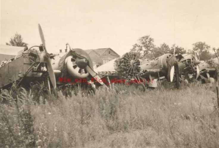 Беларуская (тарашкевіца): Пружанскі аэрадром.